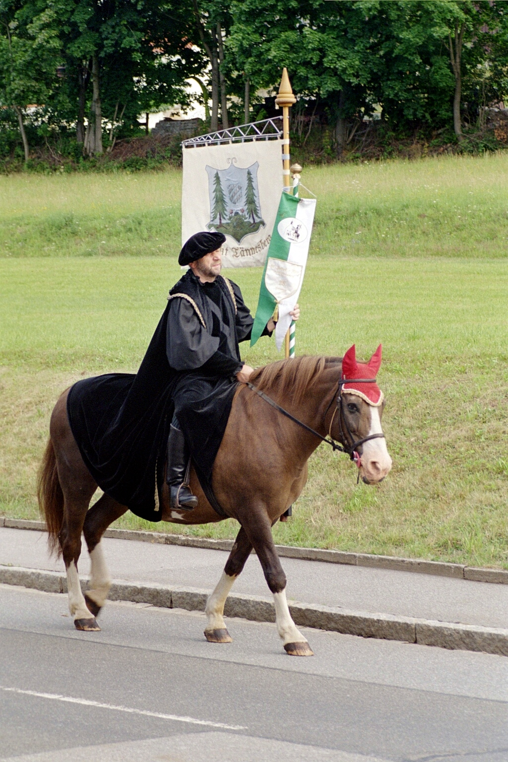 Jodokritt in Tännesberg, Landkreis Neustadt an der Waldnaab / Simon Wittmann, Landrat des Landkreises Neustadt an der Waldnaab (2005)